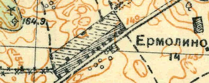 Топографическая карта Ленинградской области, квадрат О-35-24-А-г (Горки), деревня Ермолино